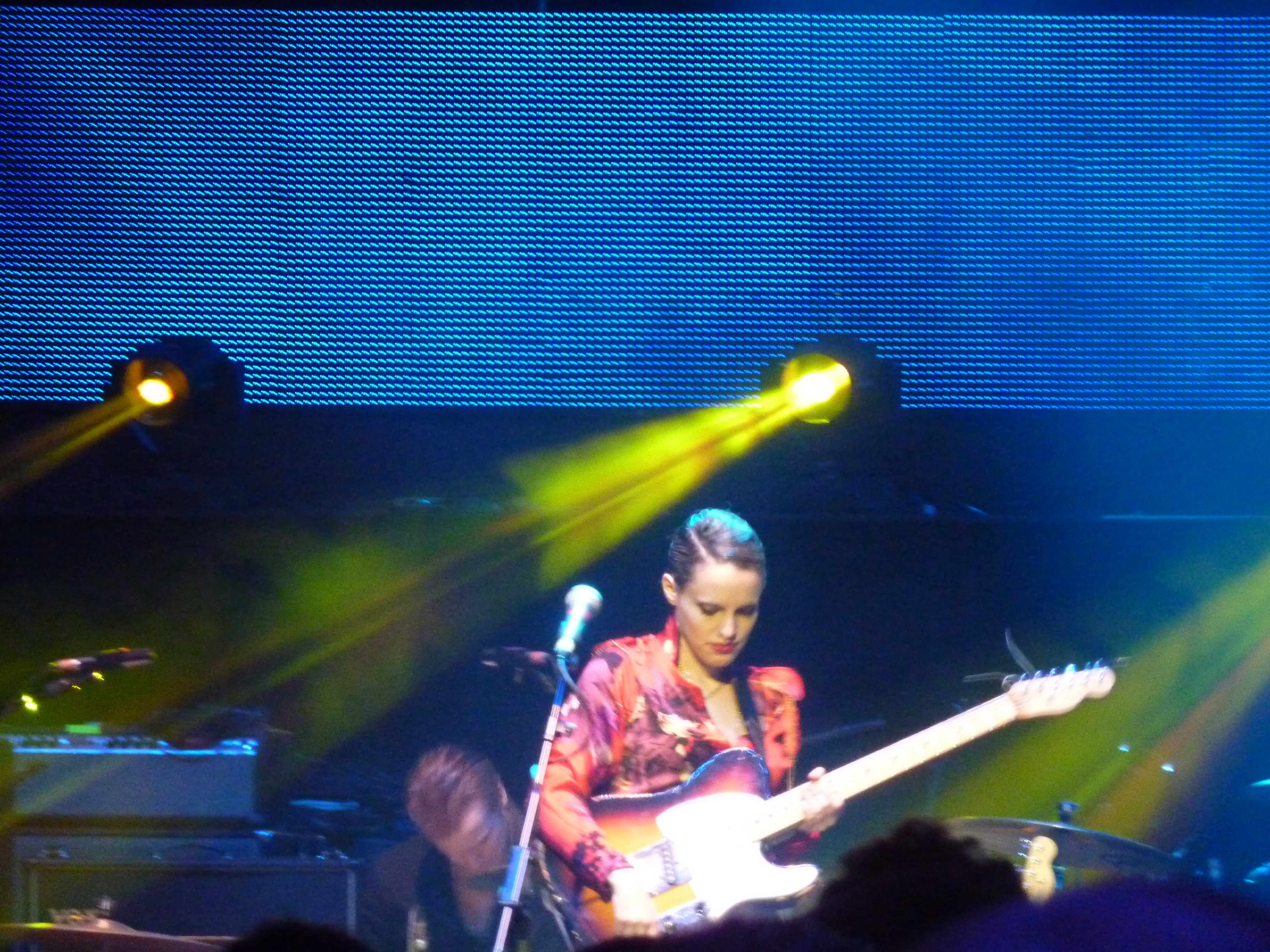 Anna Calvi.